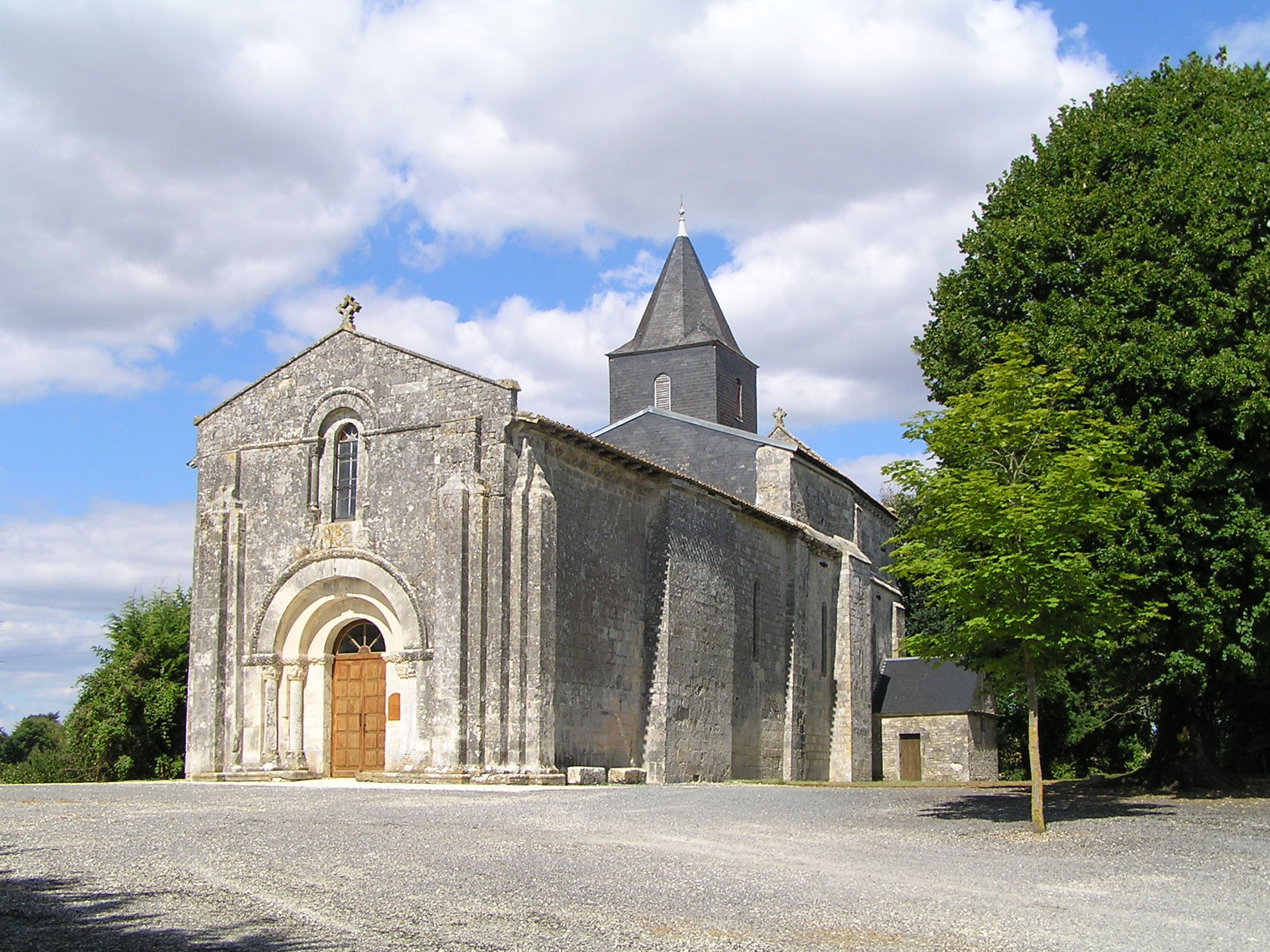 église de Mons, Charente, France